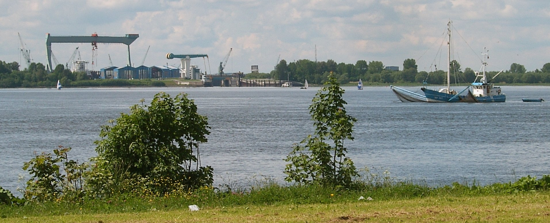 Blick von Blankenese über die Elbe in Richtung Neuenfelde und Cranz. Links im Bild die Sietas-Werft, rechts daneben die Schleuse der Estemündung. Rechts ist ein Fischkutter beim Fang zu sehen.